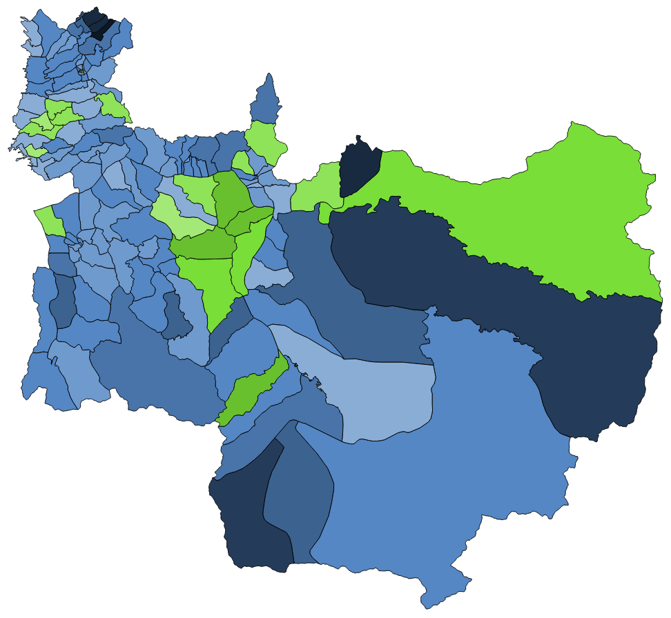 中文（台灣）: 顏色對照表 部分村里因共用投開票所 故圖中部分村里得票為依人口調整後資料